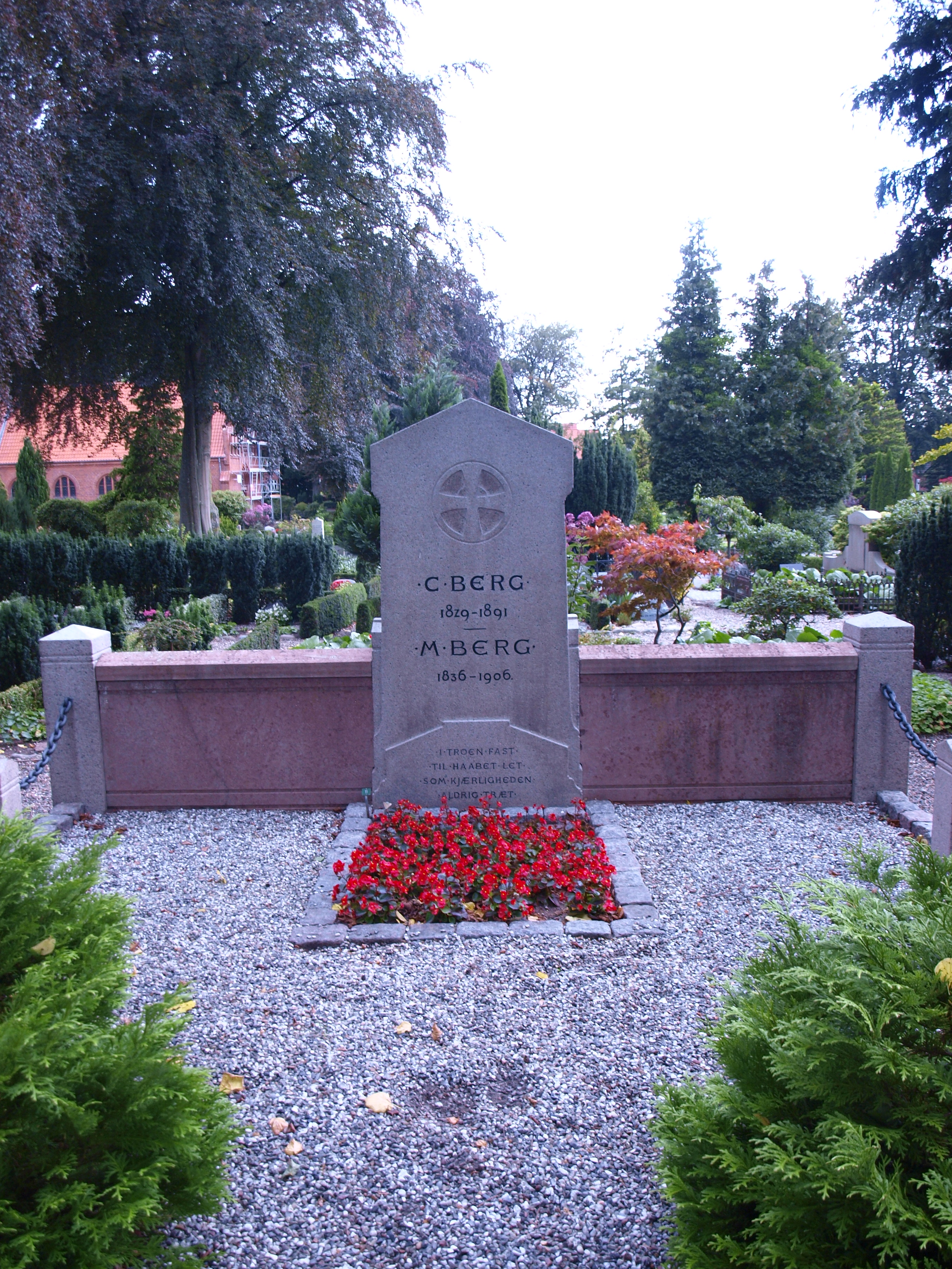 Christen Berg, 1829-1891, dansk politiker, gravsted på Koldings Gamle Kirkegård